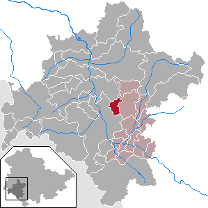 Utendorf in Thuringia - District Schmalkalden-Meiningen